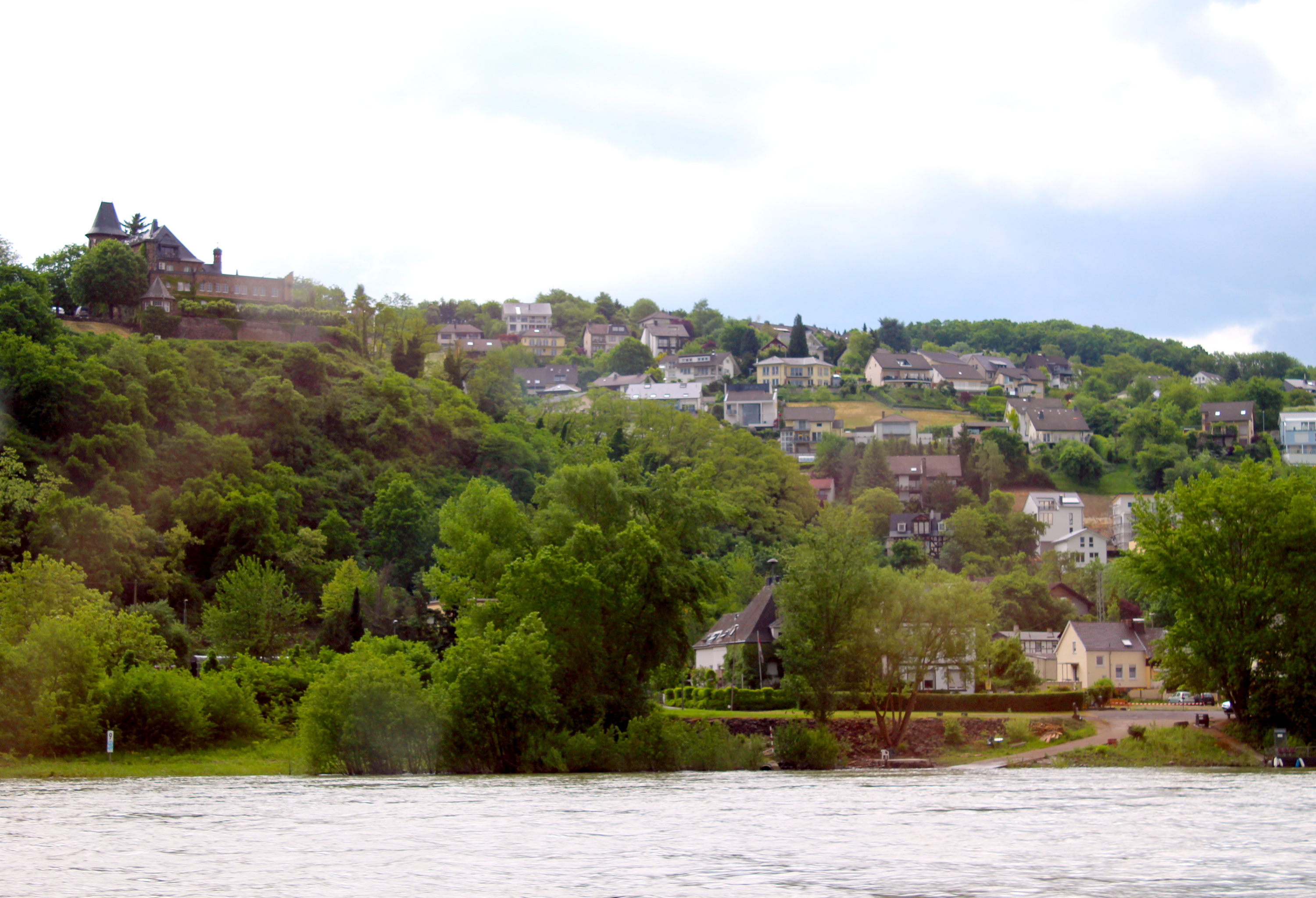 Ockenfels von der anderen Rheinseite Remagen-Kripp.